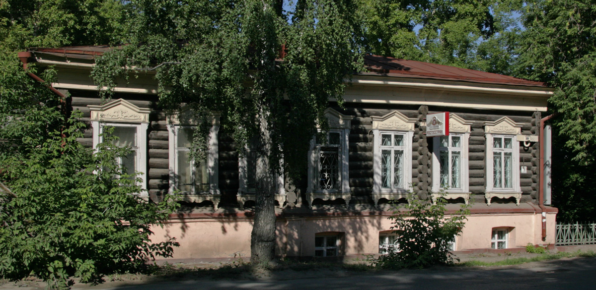 улица Крылова, 9